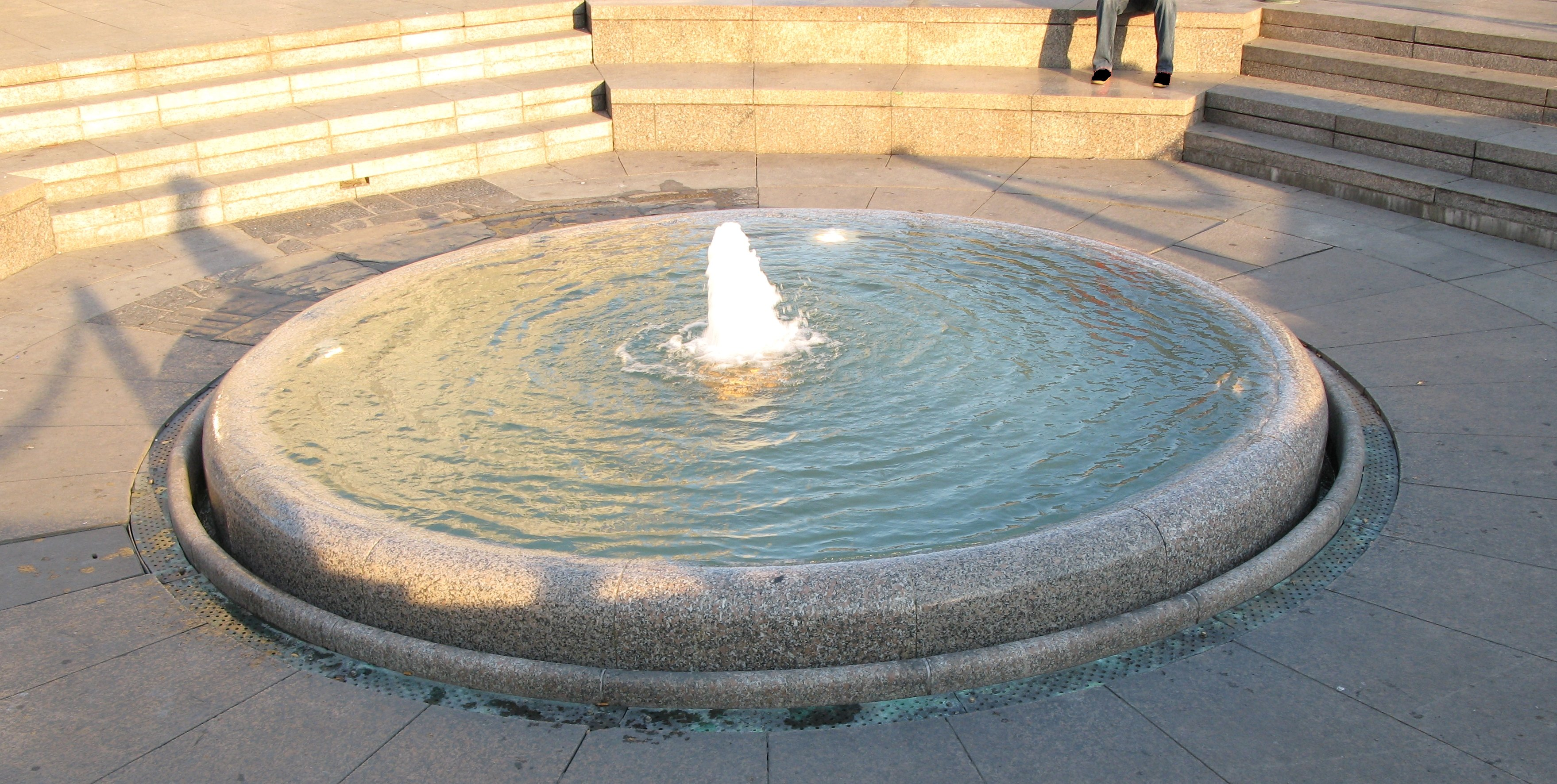 zdenac Manduševac na Trgu bana Jelačića u Zagrebu